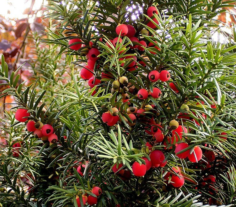 Taxus baccata